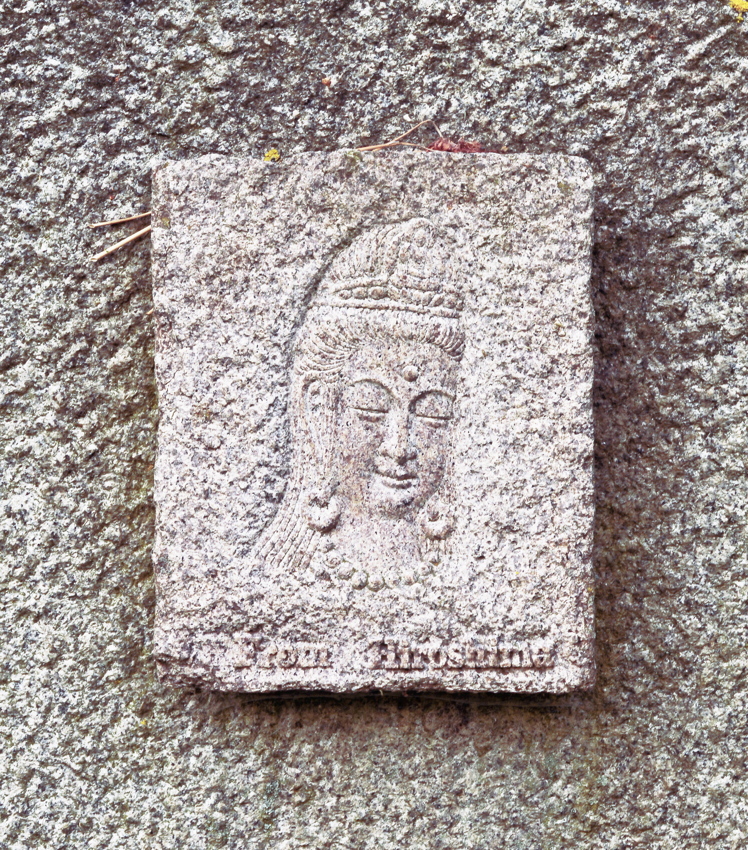 Die Granitplatte mit dem Bildnis der weiblichen Bodhisattva des Mitgefühls Kannon und der Inschrift "From Hiroshima" befindet sich auf dem Gedenkstein im Hiroshima-Hain in Hannover. Die Granitplatte ist ein Geschenk der Gesellschaft Granitplatten für den Frieden aus Hiroshima. Sie wurde am 11. Juni 1992, 8.15 Uhr im Hiroshima-Hain enthüllt. In der Schenkungsurkunde schreibt die Gesellschaft: "Die Granitplatte stammt aus der Pflasterung zwischen den Straßenbahnschienen in Hiroshima. Sie befand sich etwa 200 m nördlich des Explosionspunktes der Atombombe, die am 6. August 1945 um 8.15 Uhr abgeworfen wurde, und war daher deren Wirkung voll ausgesetzt. Als Zeuge dieses furchtbaren Ereignisses vernahm sie das Entsetzen der Opfer. In 180 dieser Granitplatten wurde später ein Bildnis der Göttin Kannon eingemeißelt, die als Symbol der Sehnsucht nach immerwährenden Frieden gilt. Aus dem Unheil, das über uns gekommen ist, aus der Schuld, die wir den vom 2. Weltkrieg betroffenen Völkern gegenüber empfinden, haben wir gelernt, uns eine "Friedensverfassung" zu geben. Darin geloben wir, daß Japan niemals mehr ein anderes Land mit Krieg überziehen wird. Eine Welt ohne Krieg ist das höchste Anliegen: die Ursehnsucht der Menschen. Mögen diese Granitsteine aus Hiroshima, die als Geschenk allen Völkern gewidmet sind, ein stetes Mahnmal des Friedens sein. Dies ist unsere inständige Bitte."